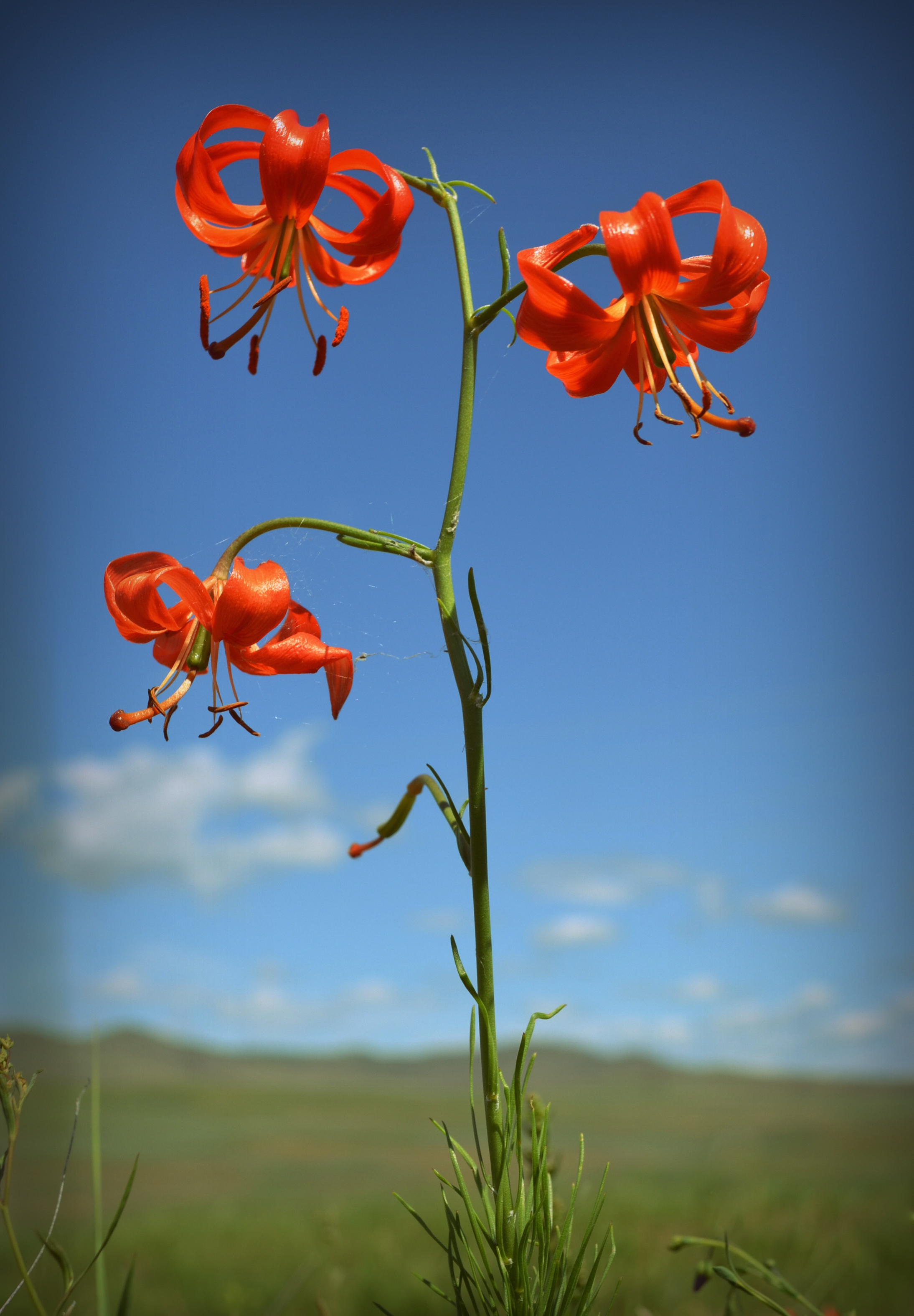 Дикая лилия - саранка